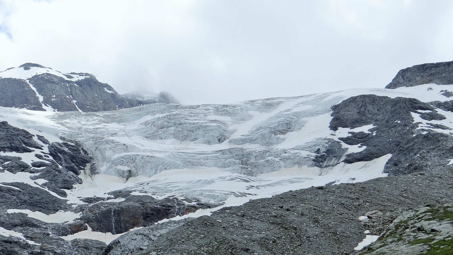 Glacier du Génépy (2700m)